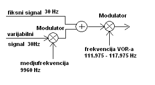 Obrada signala VOR predajnika.